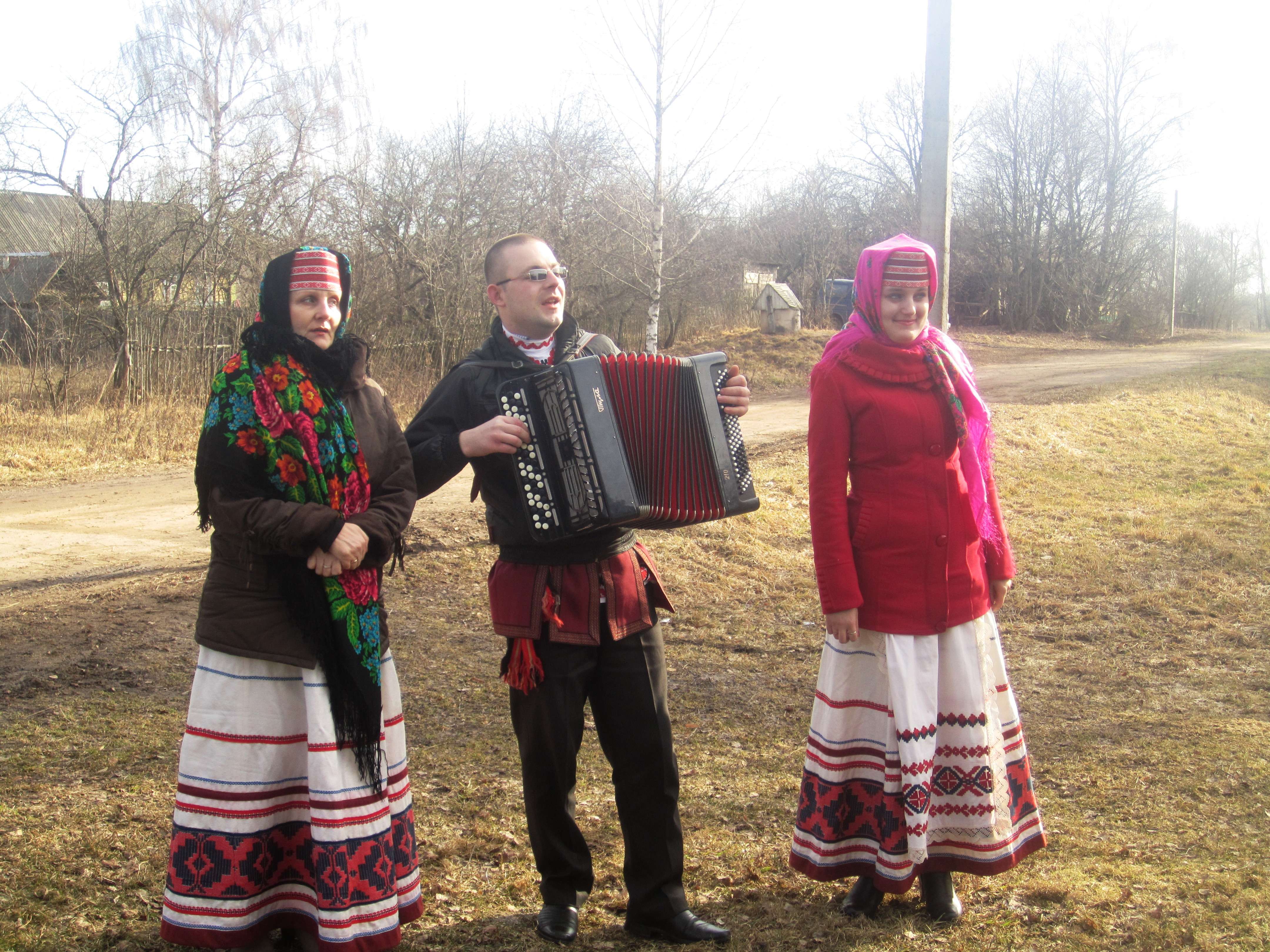 деревня